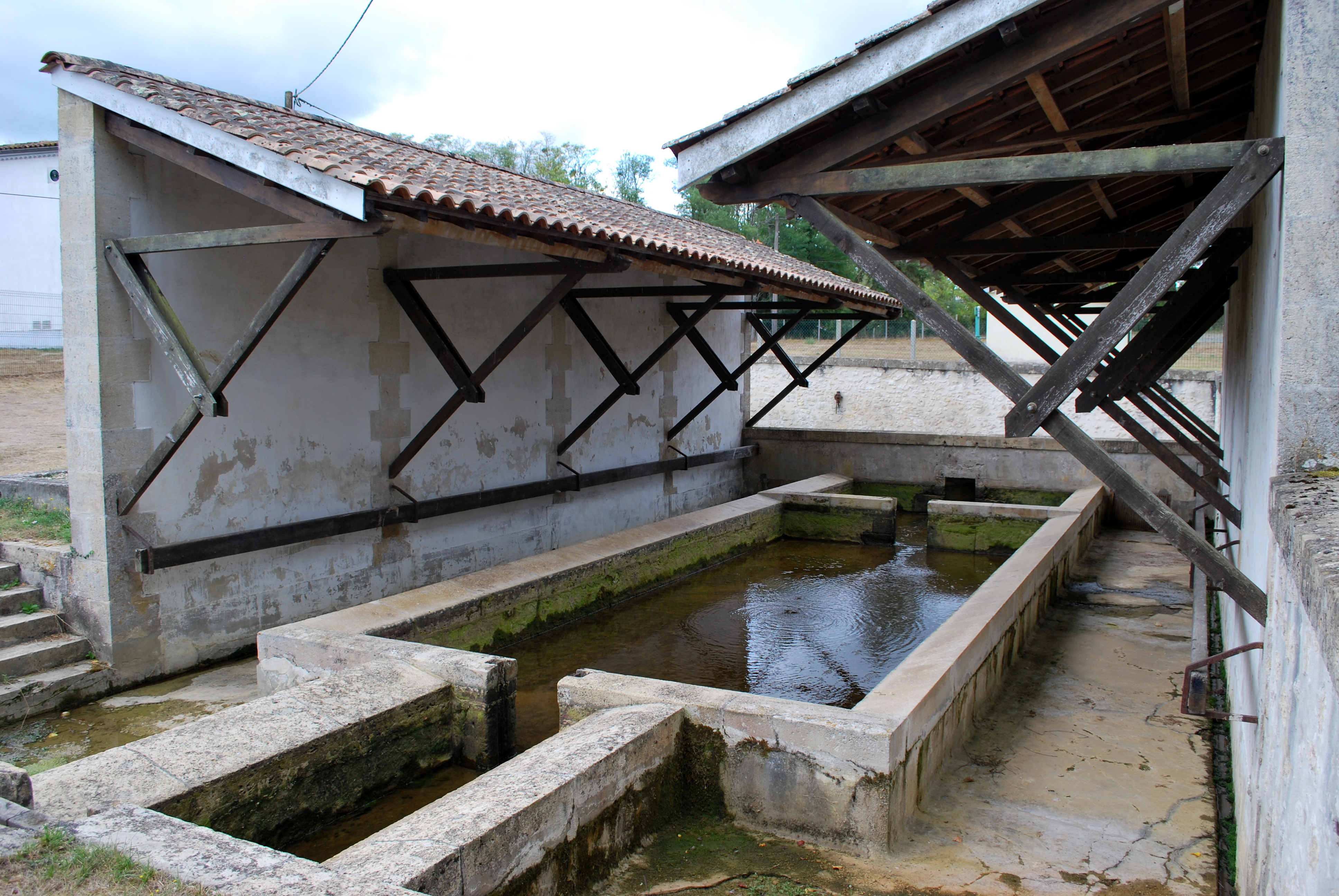 Aqueduc de Budos à Budos